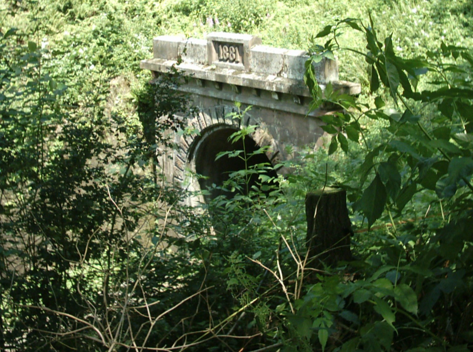 Krähbergtunnel-Portal Westseite Fotograf: presse03, selbst fotografiert 2005 Lizenz: GNU-FDL